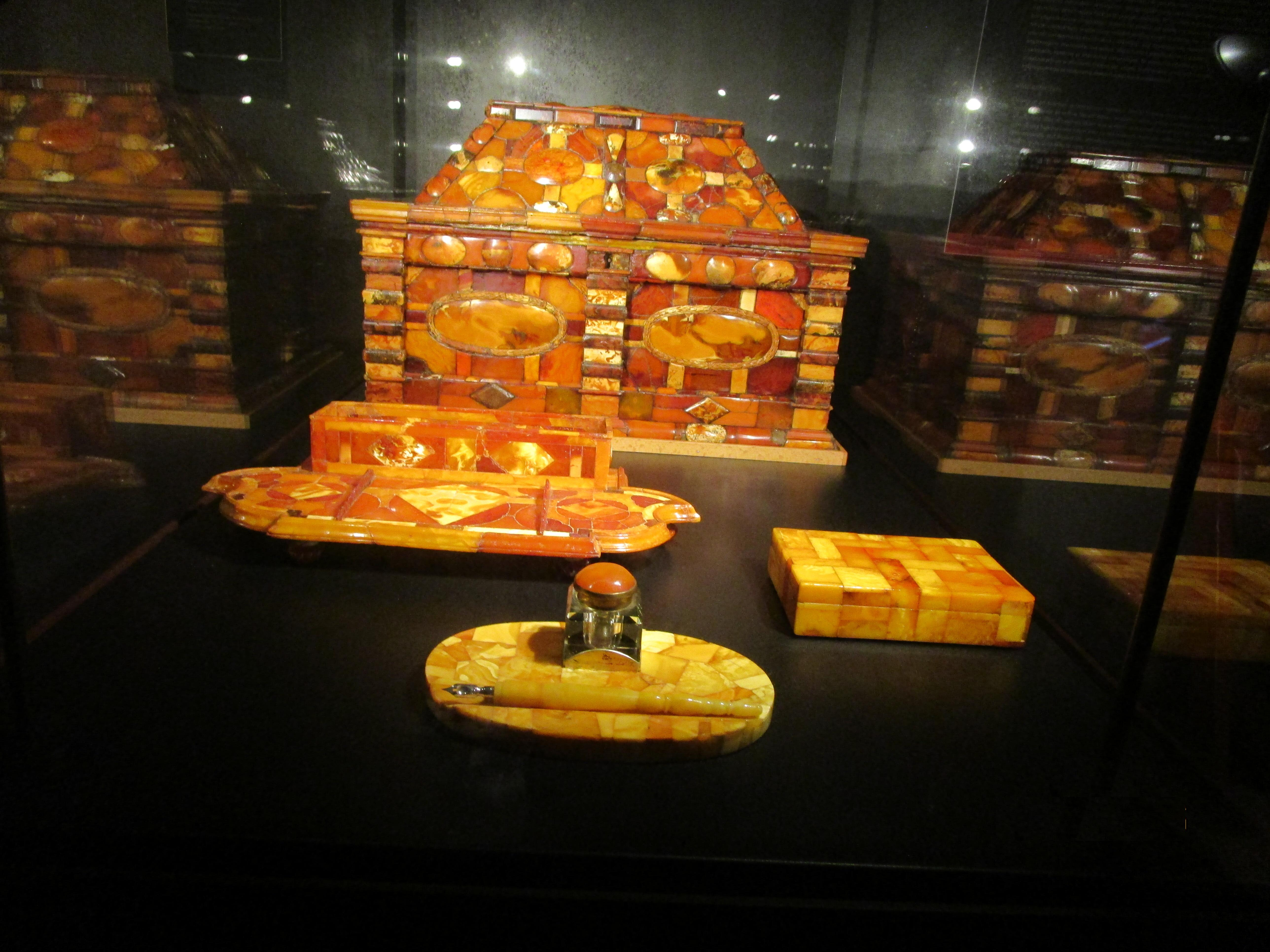 Beispiel aus dem Bernsteinmuseum